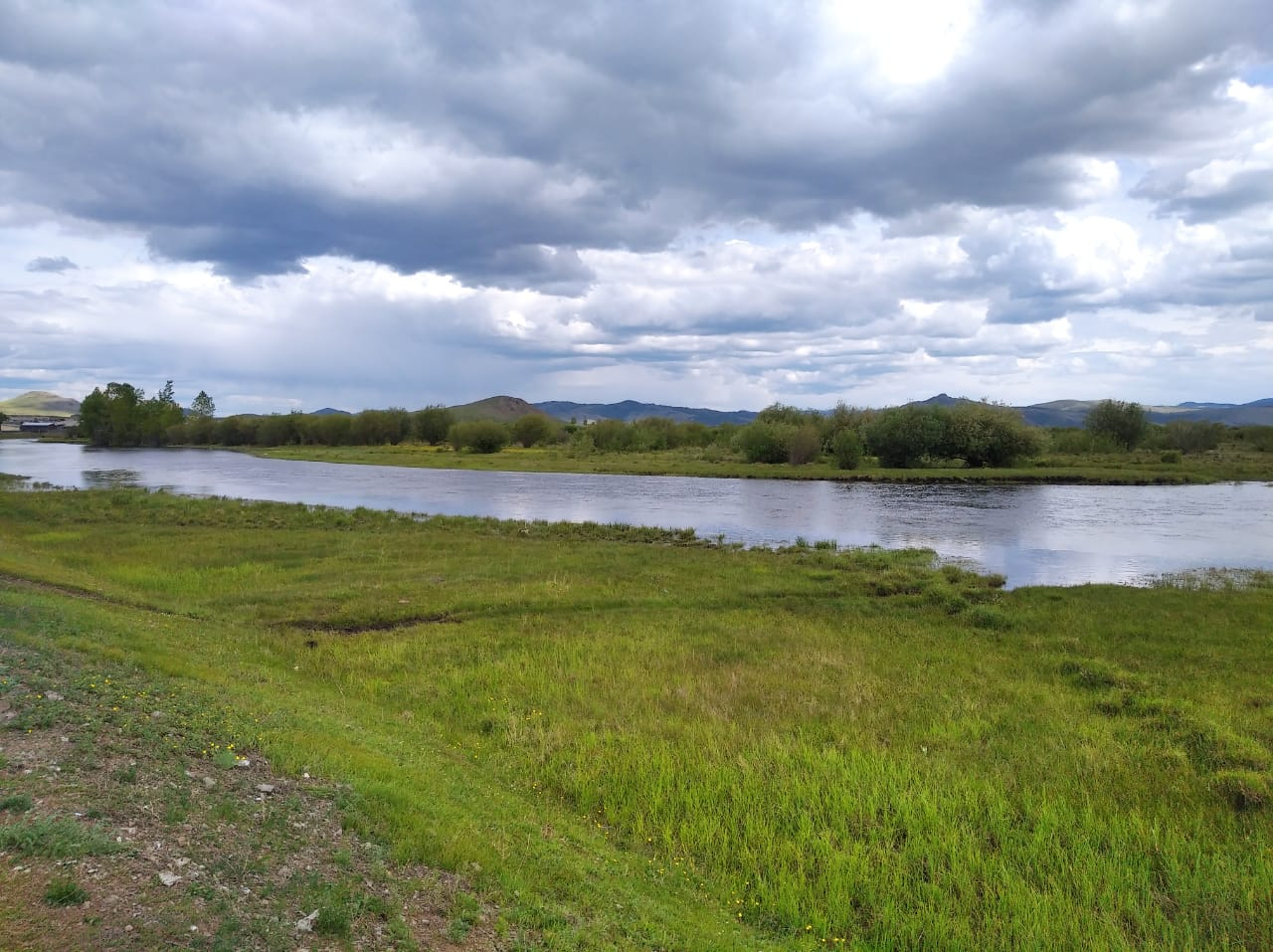 Orongoy River, Buryatia, Russia